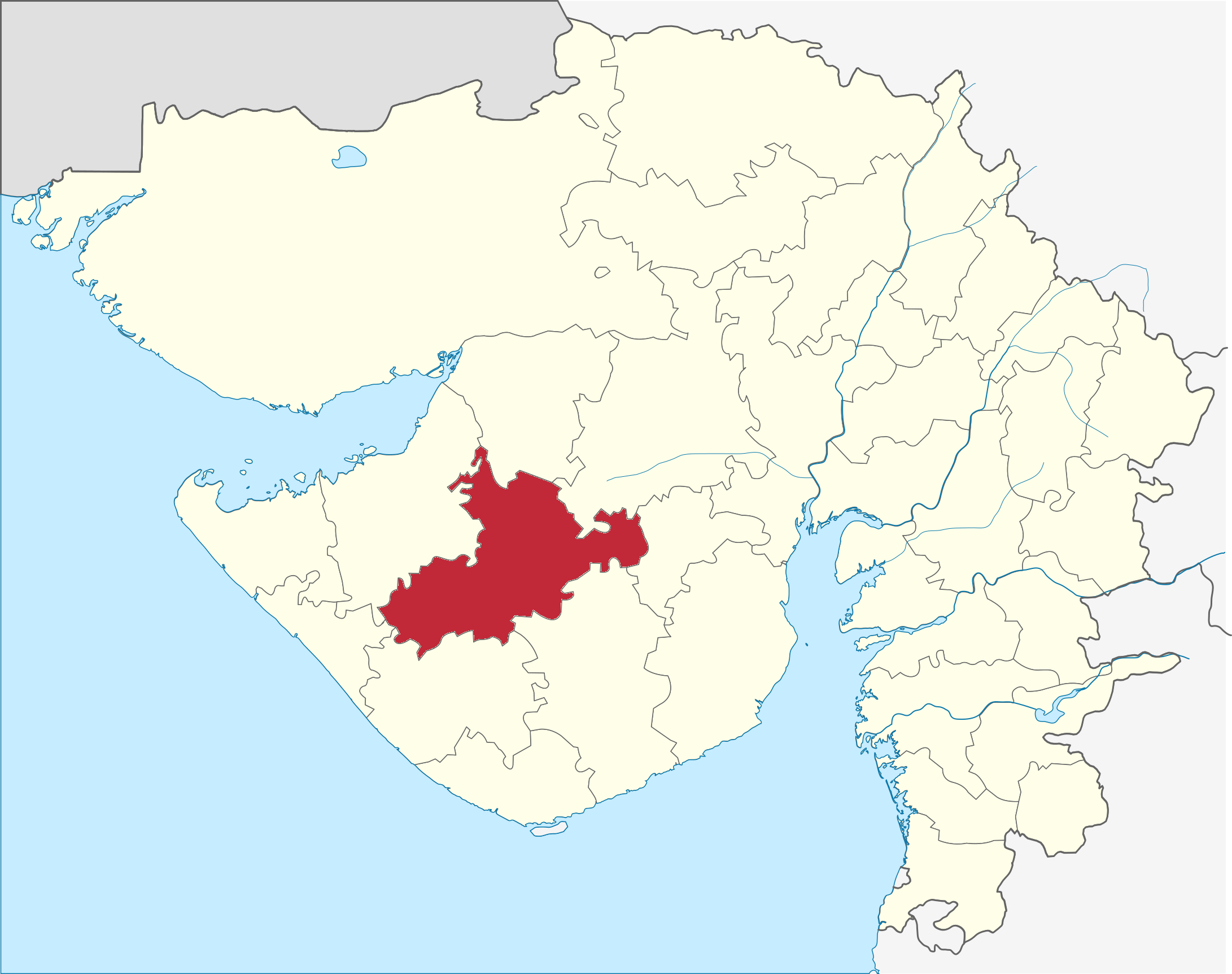 Distrito de Rajkot en Gujarat